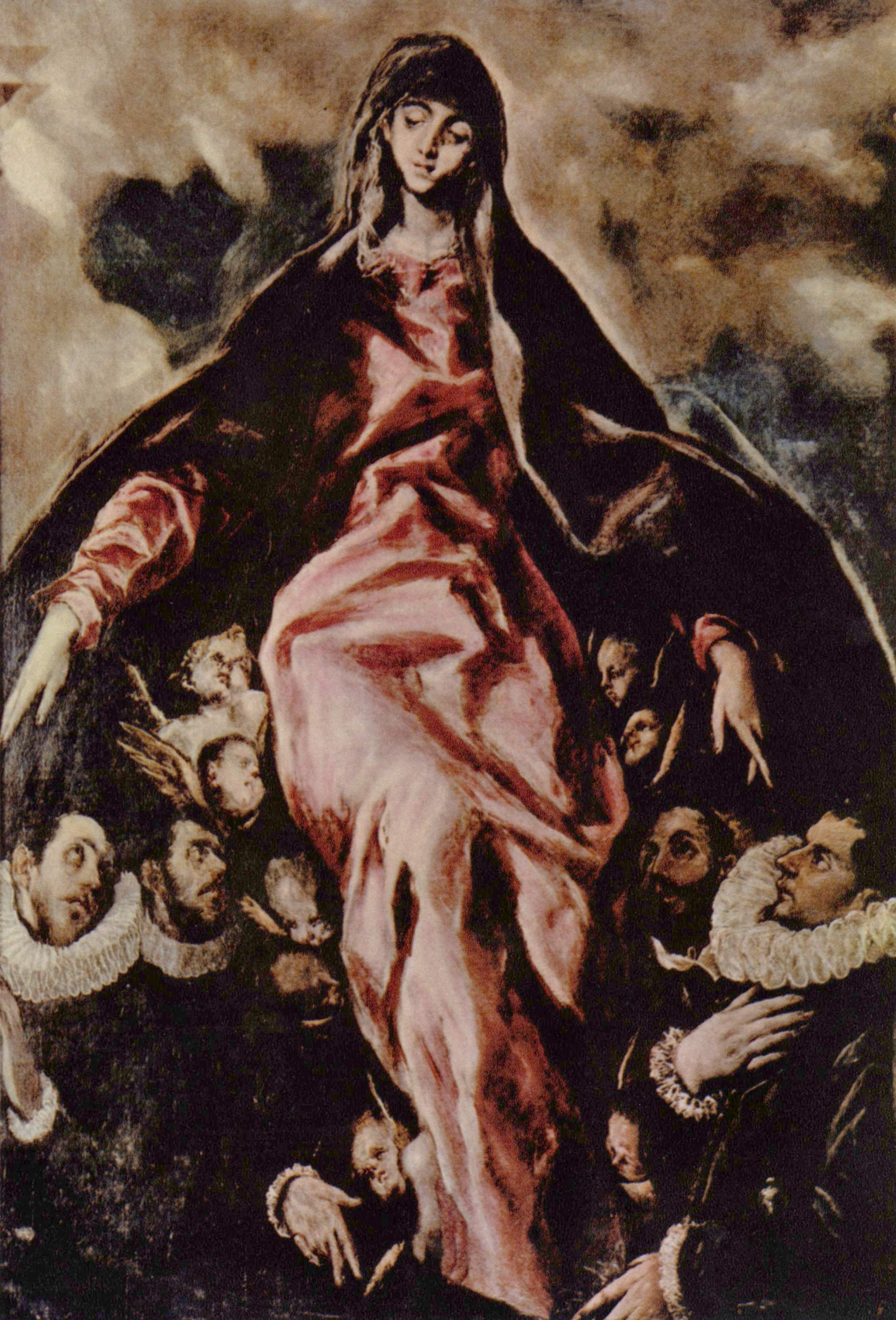 La obra, titulada la Virgen de la Caridad, representa a la Virgen María junto a un grupo de fieles.